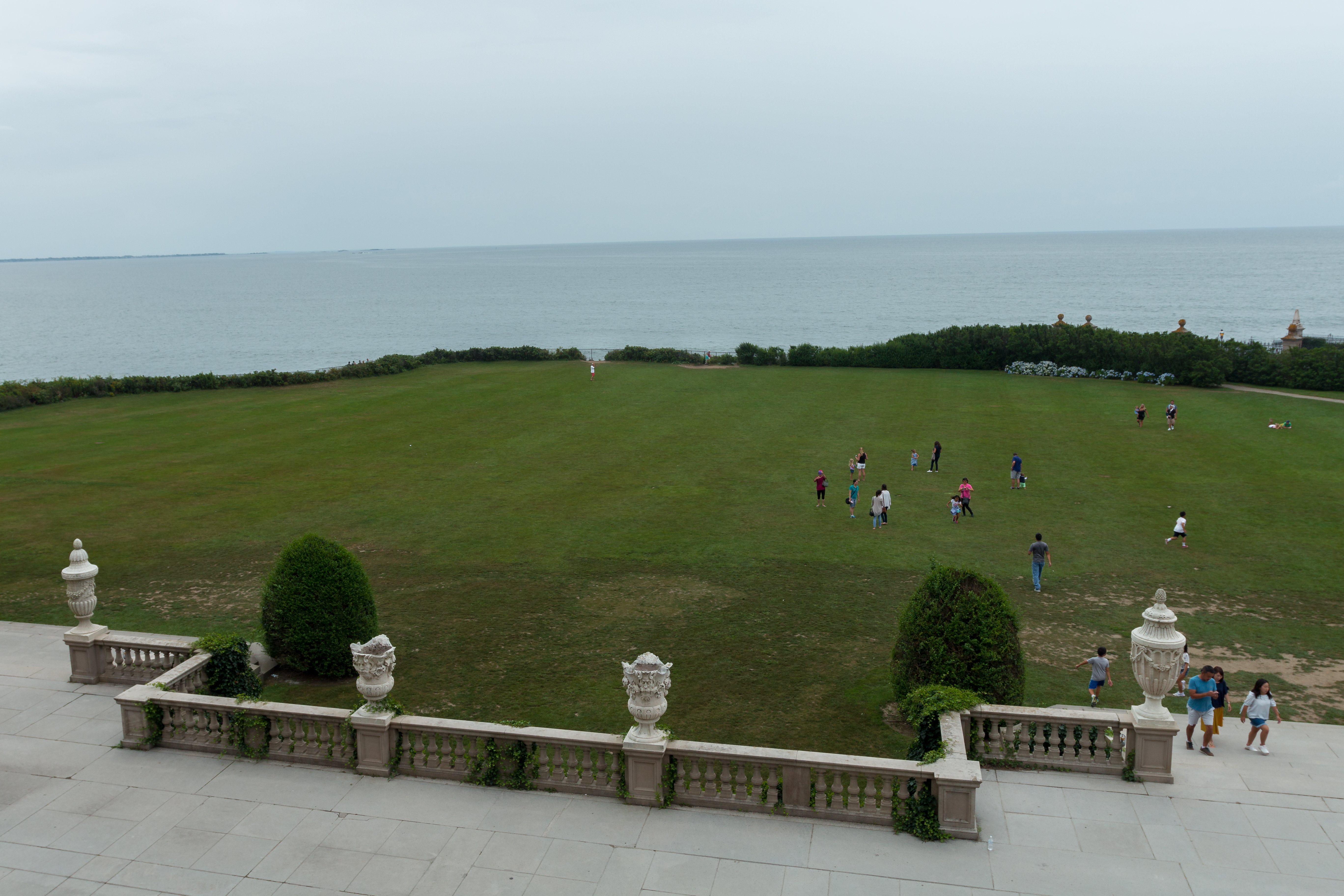 Ausblick auf den Garten von The Breakers